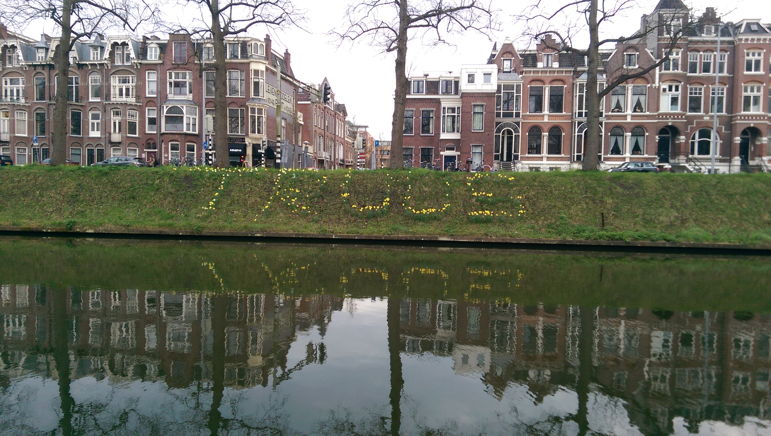 Narcissen als eerbetoon aan de verzetsstrijdster Truus van Lier (1921-1943), 2016, Utrecht (NL), Catharijnesingel, 52°05'04.76" N 5°07'10.91" O